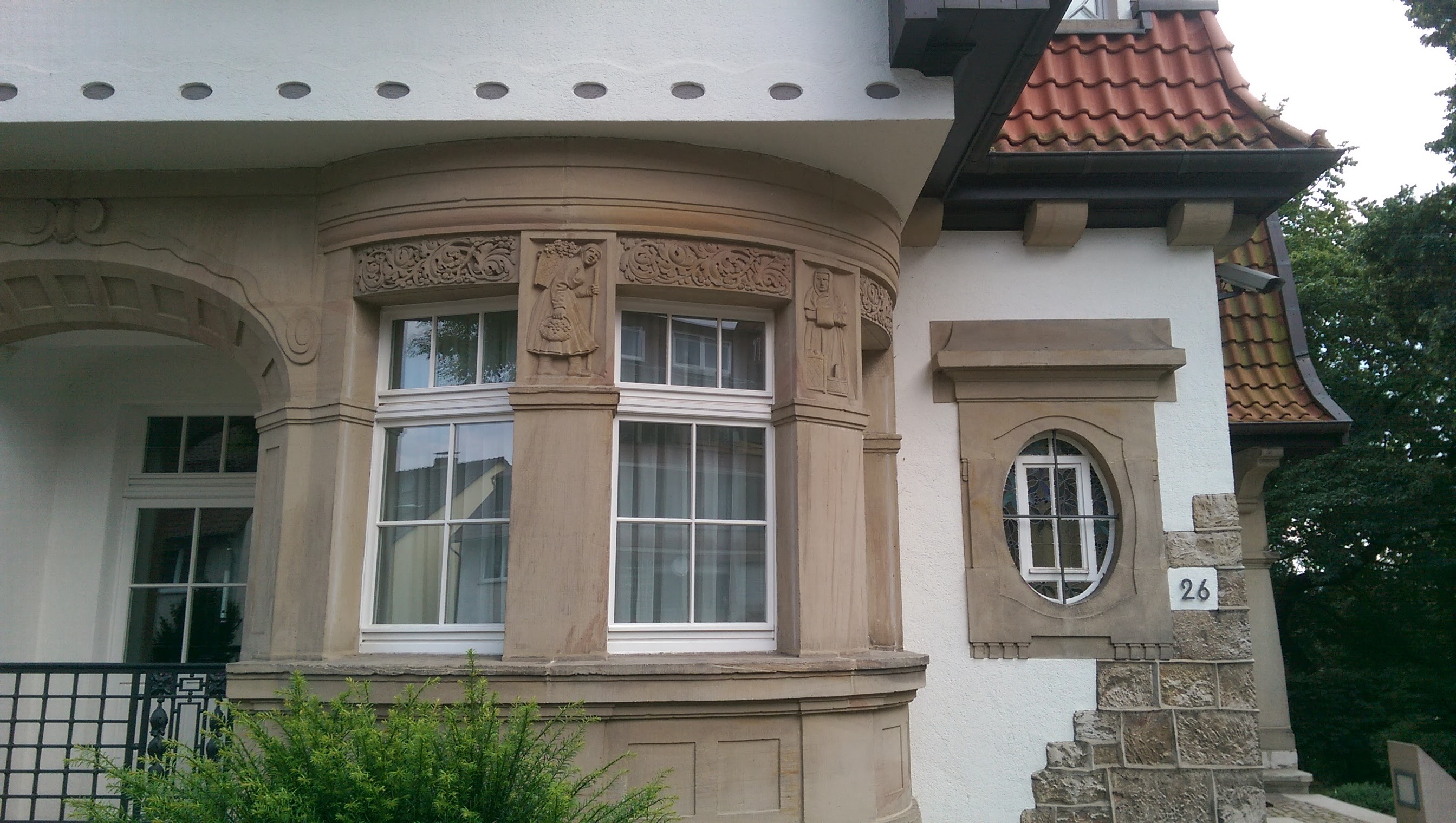 Jugendstilvilla Kasseler Straße 26 in Warburg (ehem. Eigentümer: Hugo und Mary Berg)